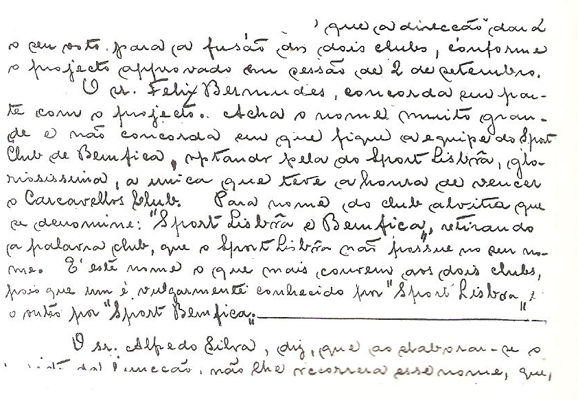 Extracto da acta de 4 de Setembro de 1908, onde Félix Bermudes "apadrinha" nome do Sport Lisboa e Benfica.